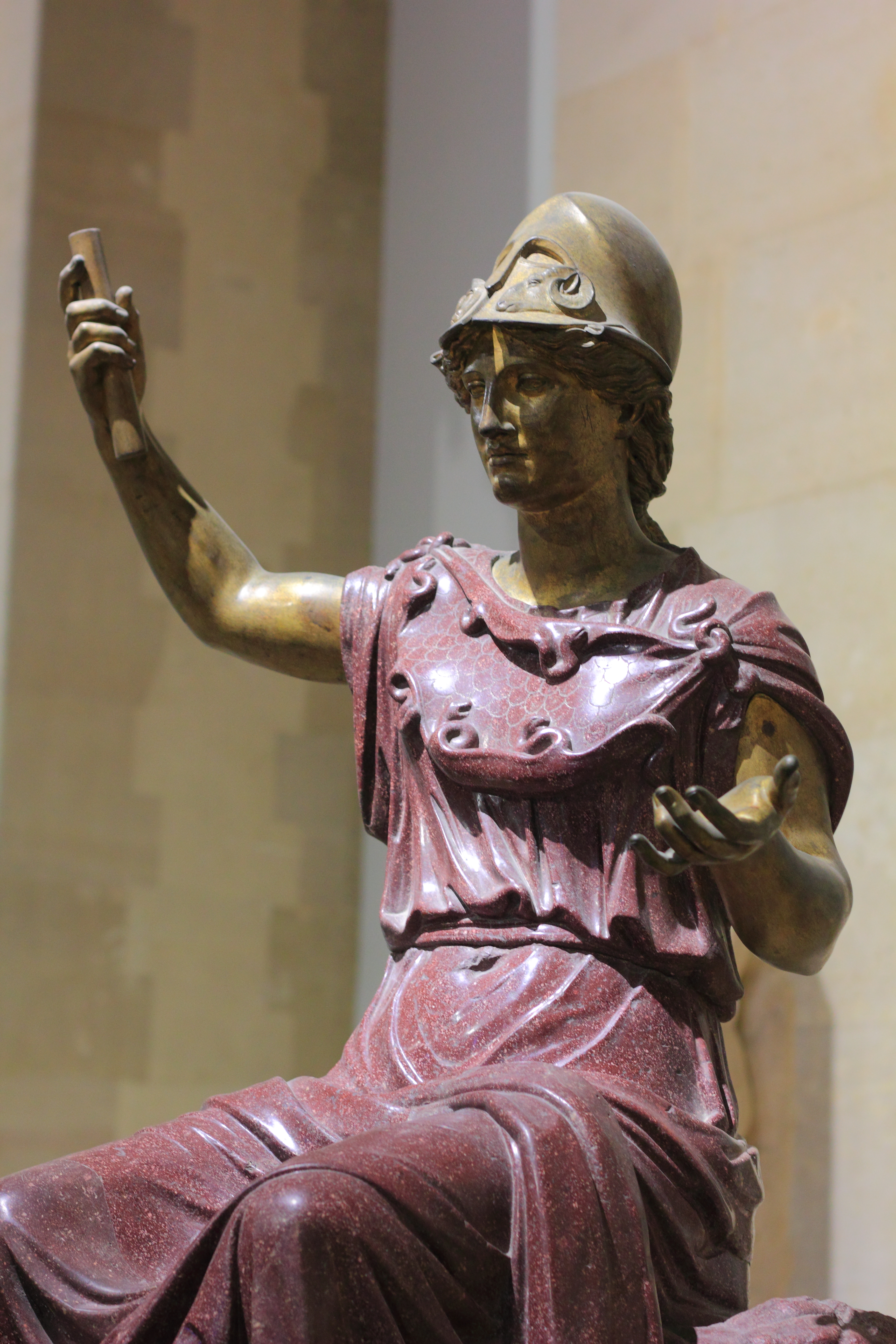 Seated Minerva restored as Dea Roma, red porphyry (ancient body, 2nd century AD, completed by Francuccio Francucci) and gilt bronze (modern head and arms, 17th and 18th centuries). From the gardens of San Martino de’ Monti, Rome.